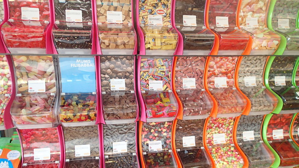 Dette er de nyeste hyllene til Candyking som er å finne i mange butikker nå.